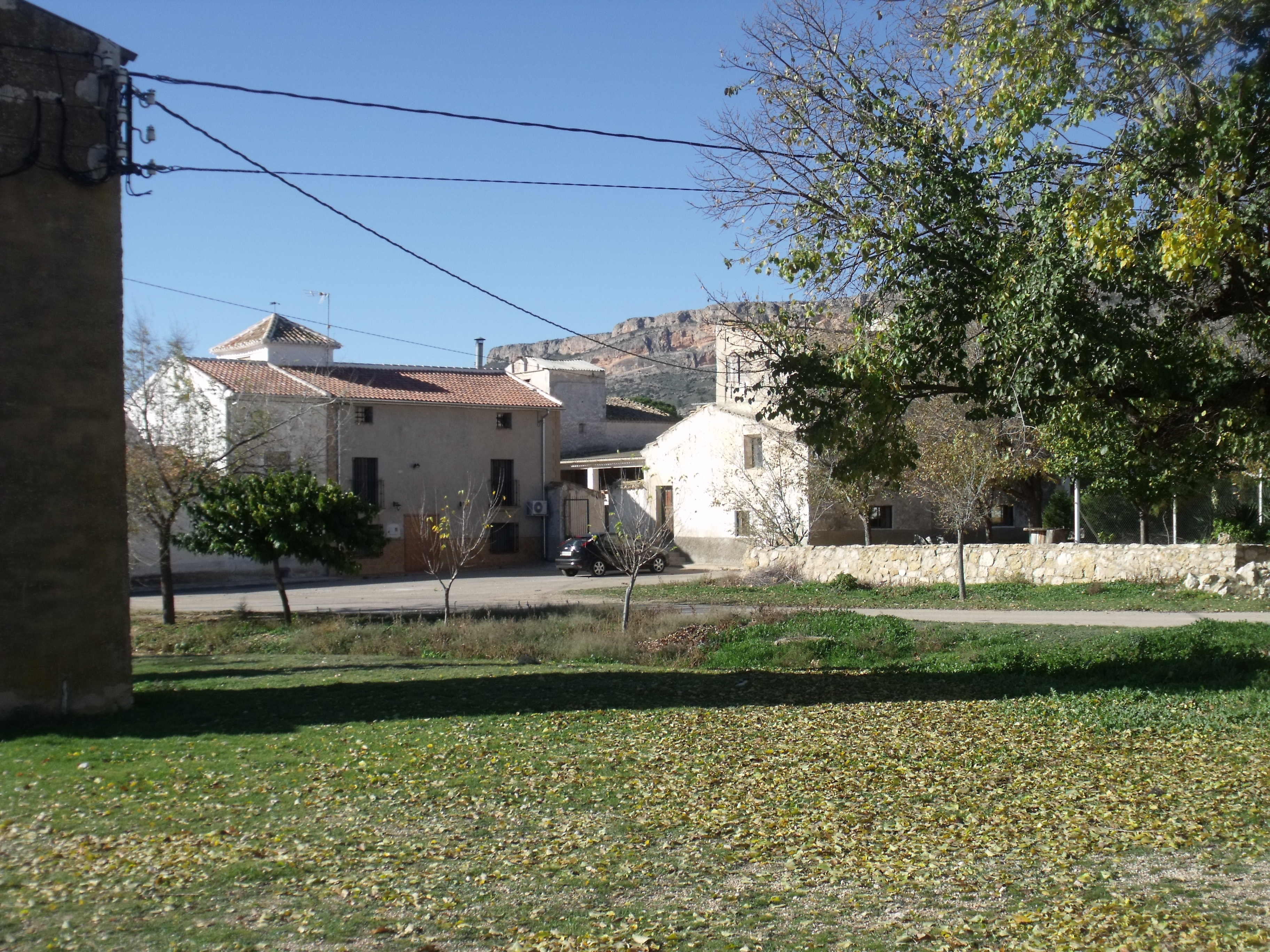 Aldea de San Benito, Aiora